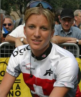 Nicole Brändli, Schweizer Radsportlerin